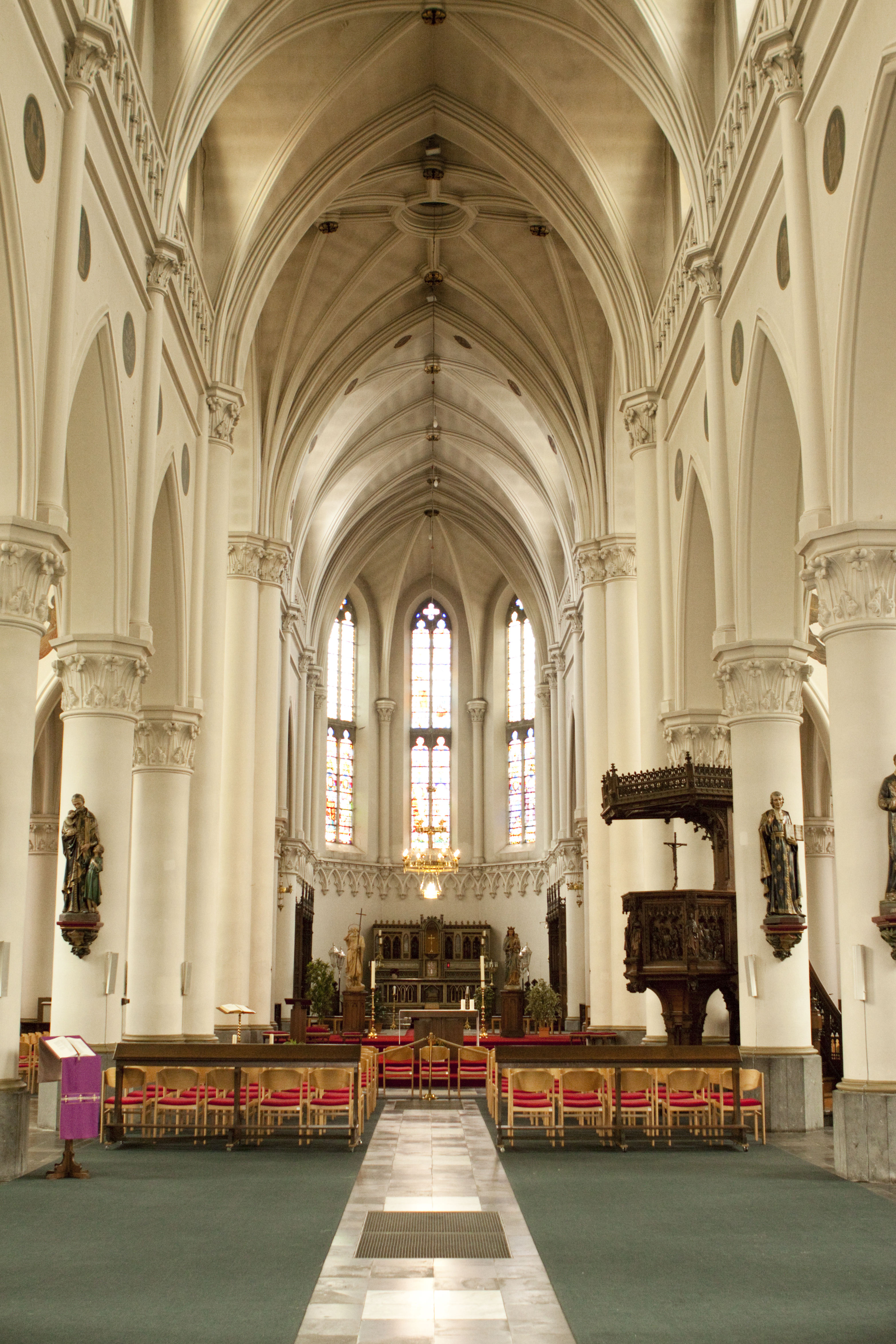 Sint Jan-Baptistkerk